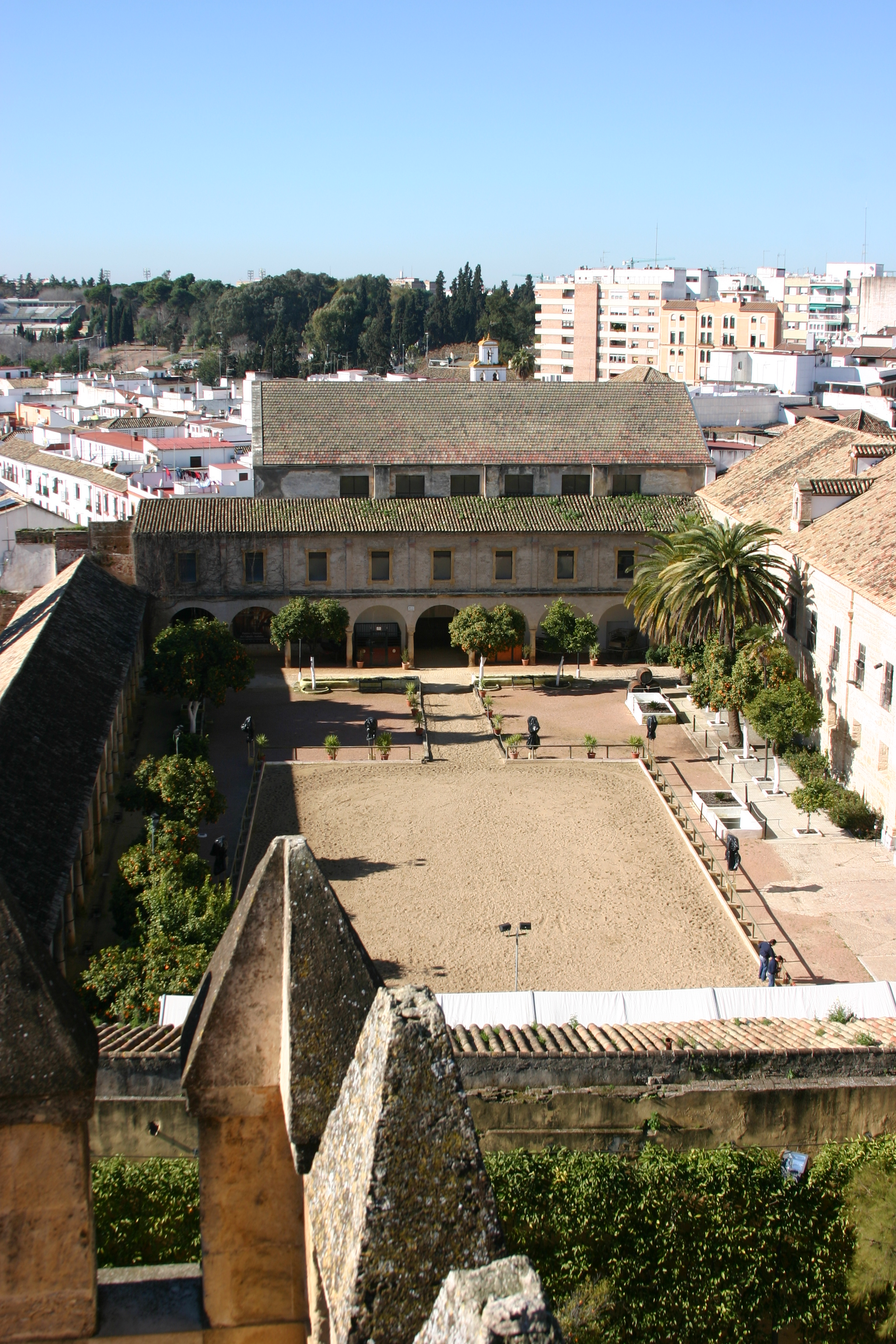 Cavalariças Reais